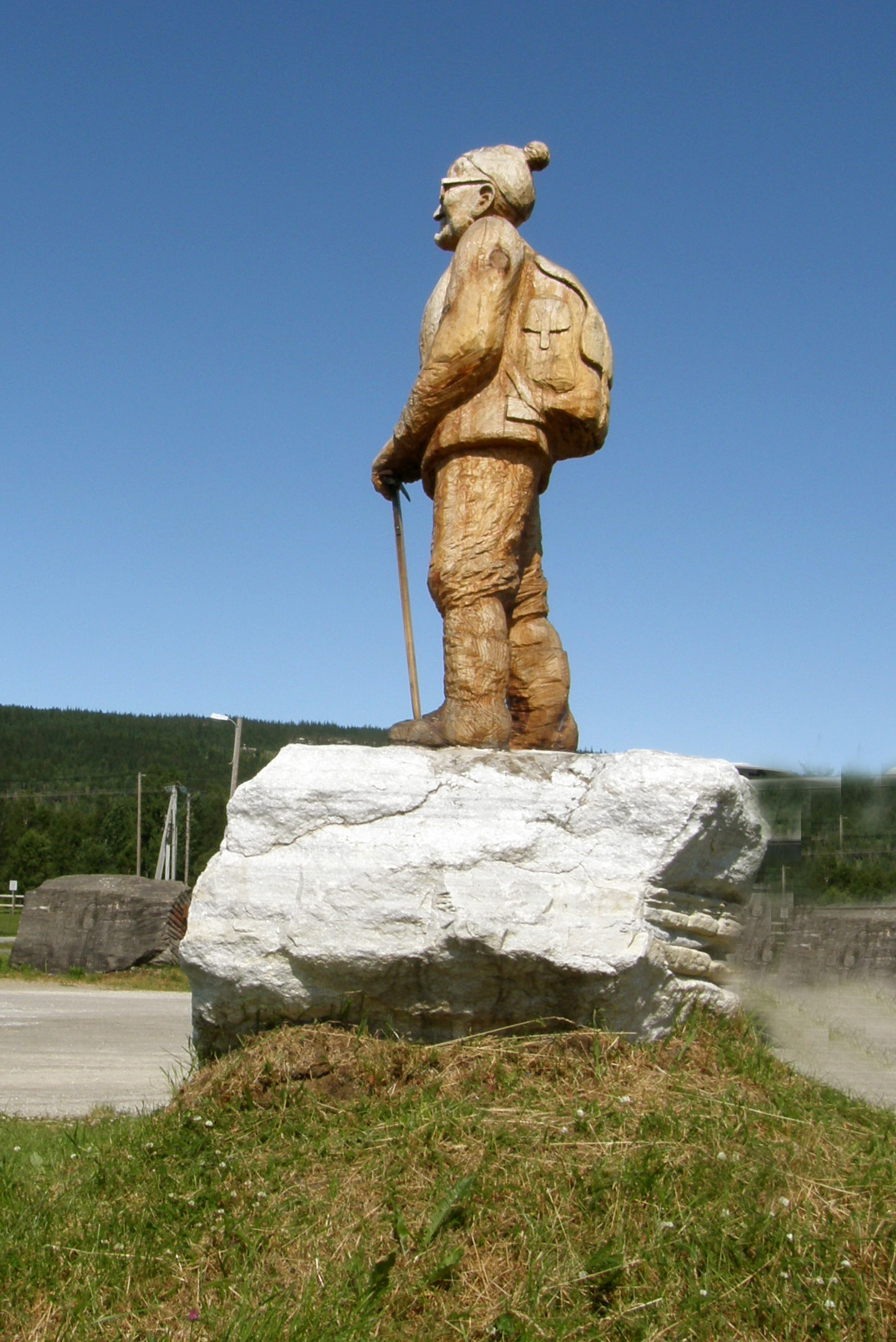 Staty av "Svartiskungen" på rastplatsen på Røssvoll i Mo i Rana, skulpterad av Arne Kalkenberg.